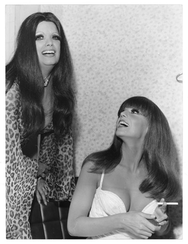 Fotografía blanco y negro, sobre papel fotográfico brillante. Escena en un interior, con dos personajes femeninos. De pie, a la izquierda, la vedette Nélida Roca y sentada mirándola desde la derecha, la actriz Susana Giménez.